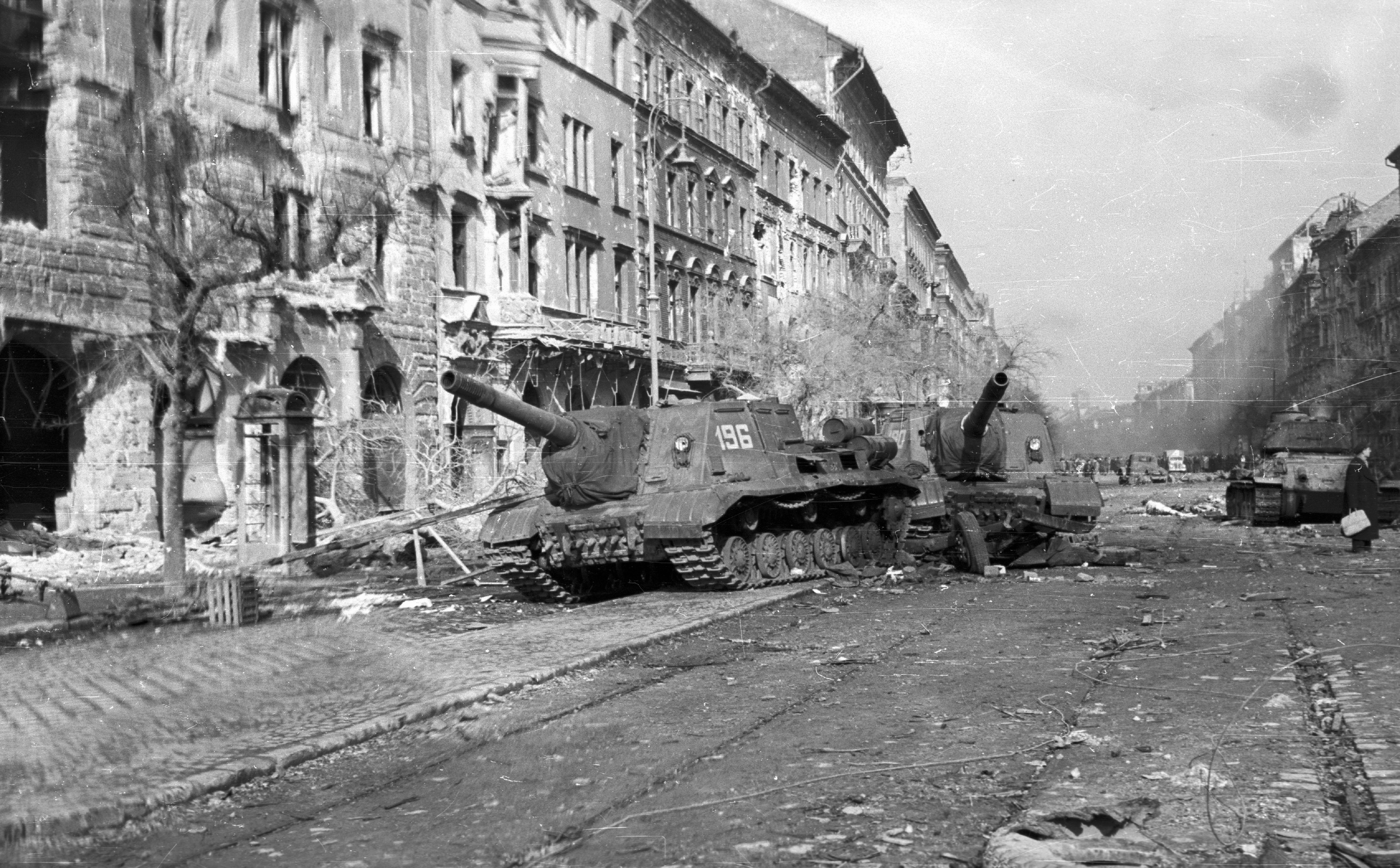 József körút a Corvin (Kisfaludy) köztől nézve. Harcképtelenné tett ISU-152-es szovjet rohamlövegek, a háttérben egy T-34/85 harckocsi. Location: Hungary, Budapest VIII. Tags: revolution, street view, tank, damaged building, wreck, Soviet brand, war damage, combat vehicle, ISU-152 assault gun, Budapest Title: József körút a Corvin (Kisfaludy) köztől nézve. Harcképtelenné tett ISU-152-es szovjet rohamlövegek, a háttérben egy T-34/85 harckocsi.